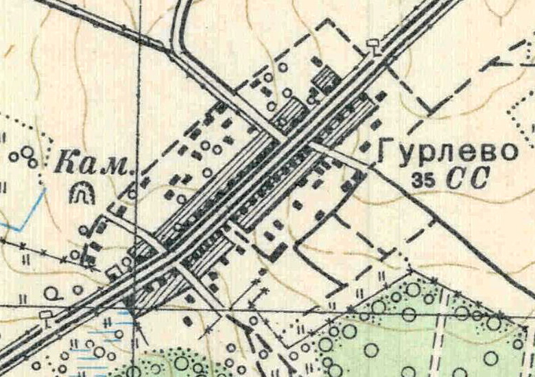 Топографическая карта Ленинградской области, квадрат О-35-22-Г-б (Гурлево), деревня Гурлево.